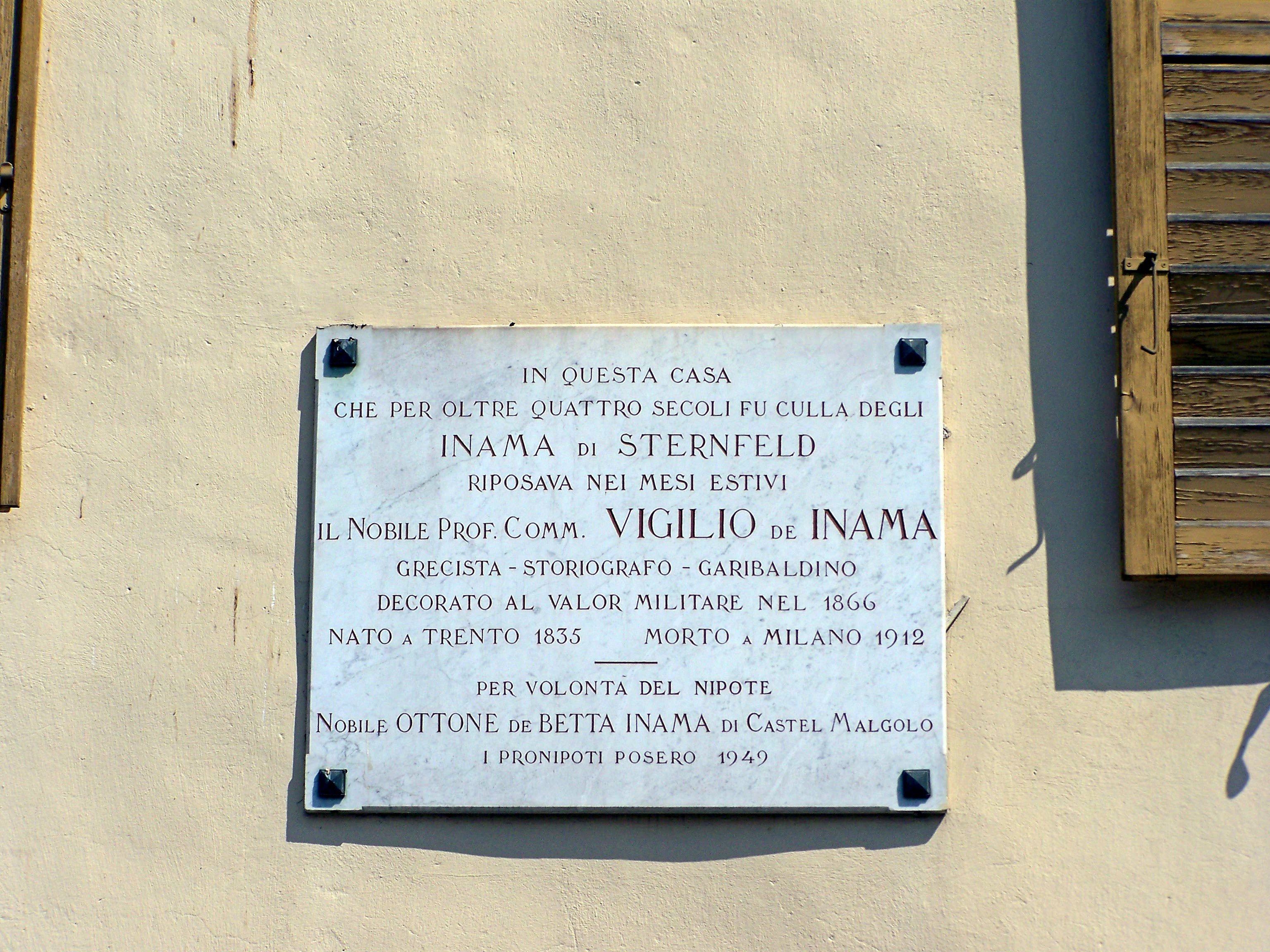 Lapide commemorativa di Vigilio Inama a Fondo